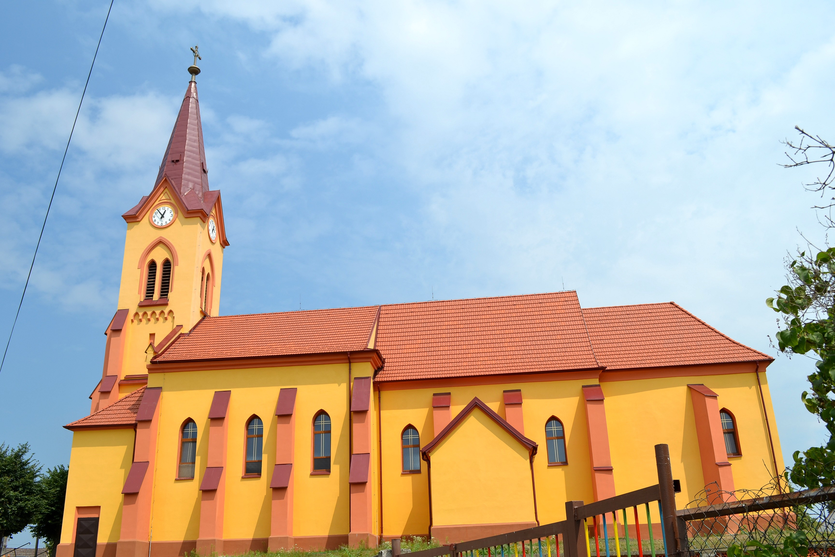 Jakubov (okr. Malacky), Kostol svätých Filipa a Jakuba; celkový pohľad od juhu